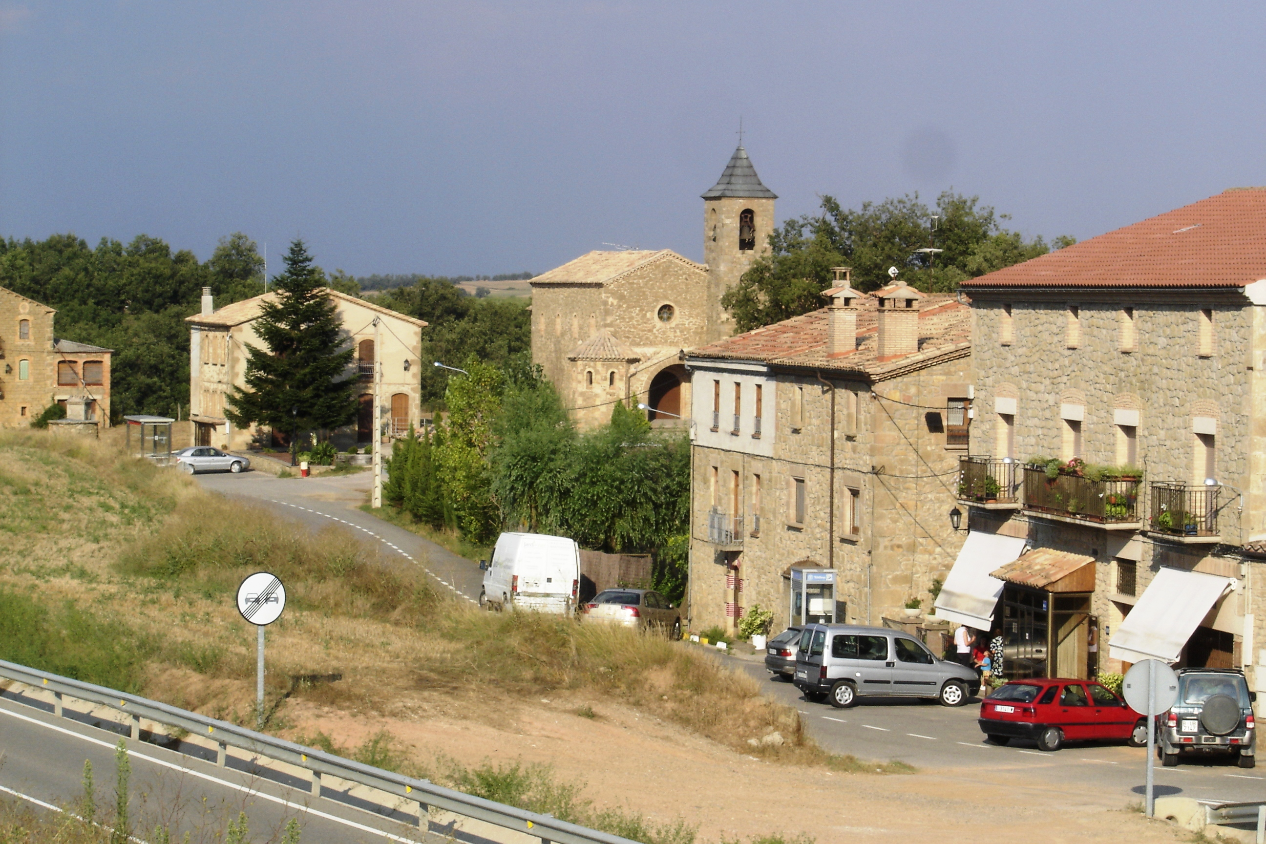 Llobera (Solsonès) - L'Hoastal Nou - Darrere l'avet, l'escola i l'ajuntament i a la seva dreta, l'església parroquial.